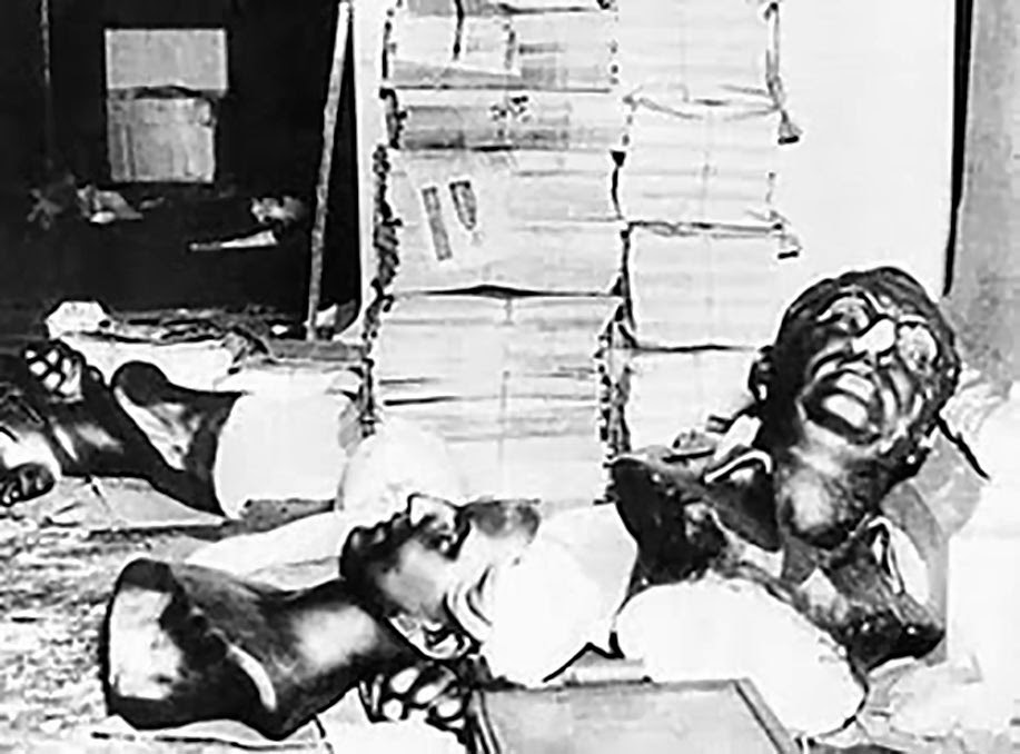 Revolución Libertadora